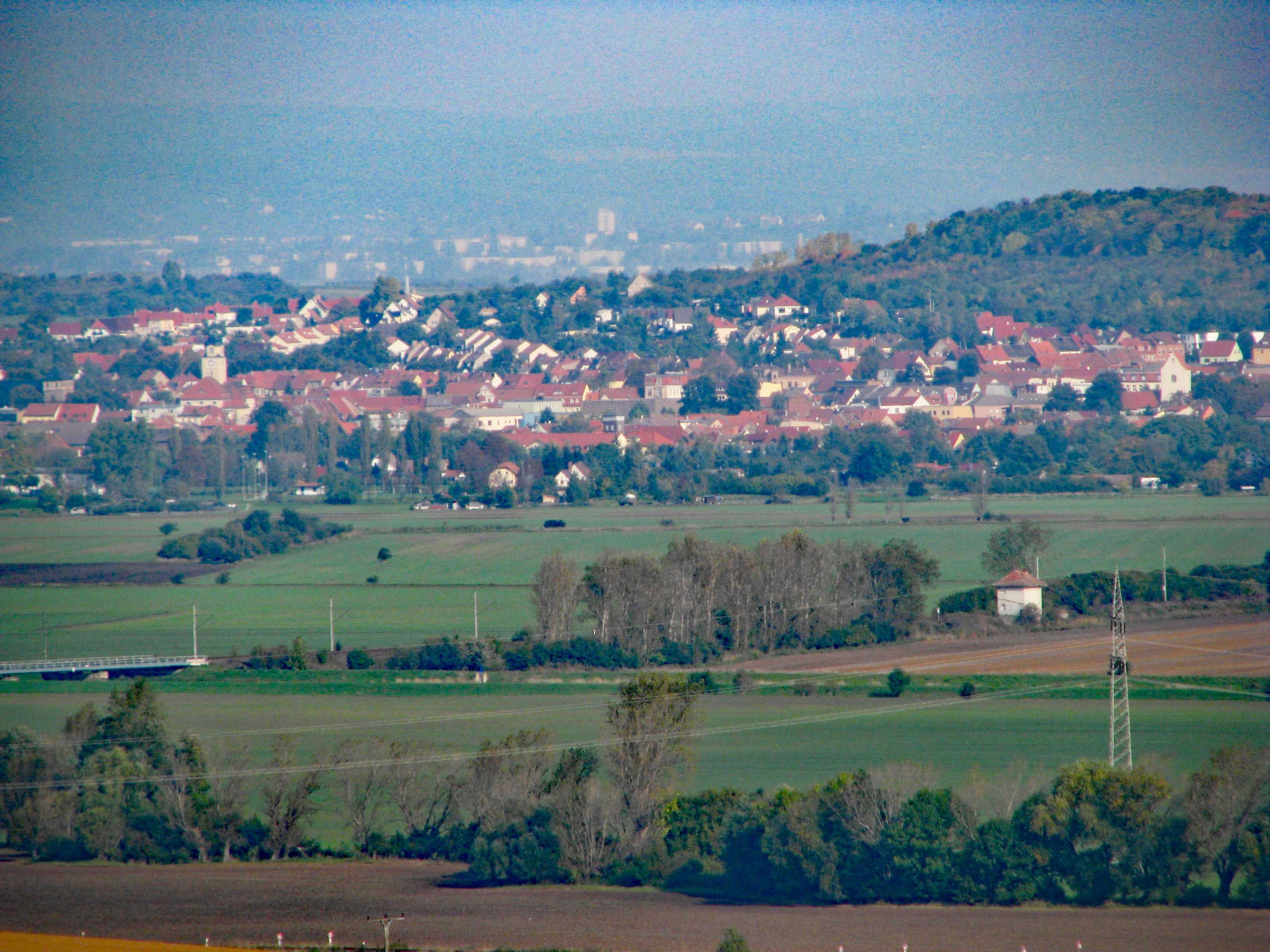 Artern von der Hohen Schrecke aus gesehen. Im Vordergrund das Unstruttal.